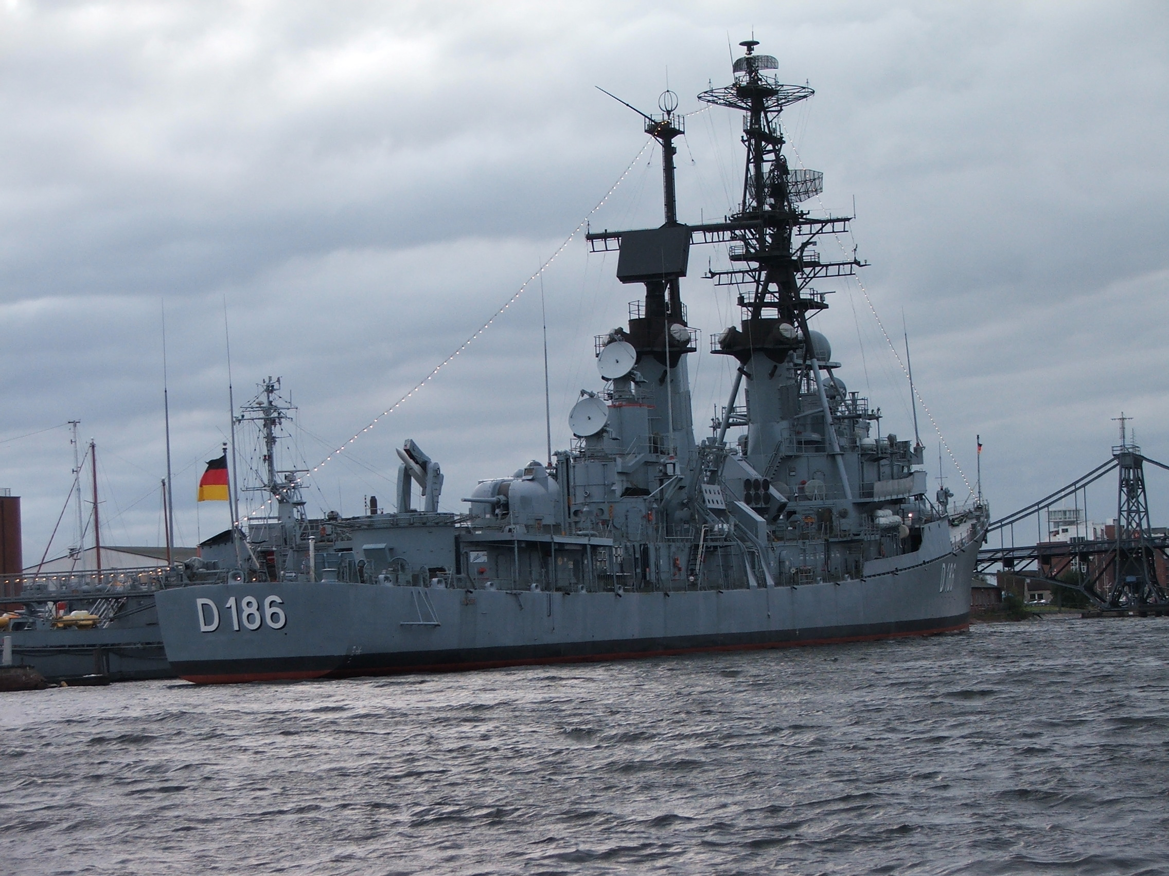 D 186 von achtern